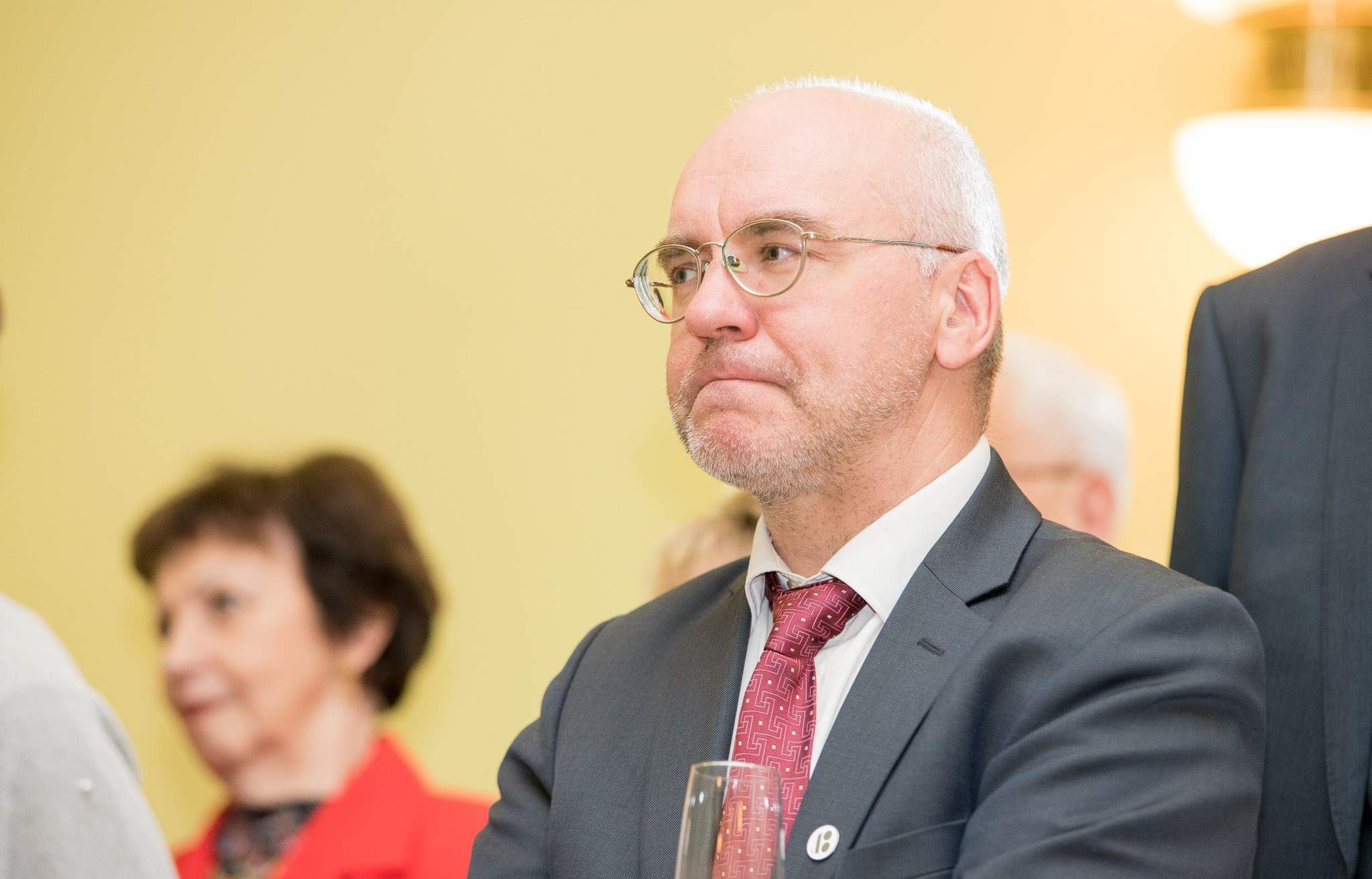 Erik Roose, ERR-i juhatuse esimees. Kultuuriministeeriumi 65. aastapäev